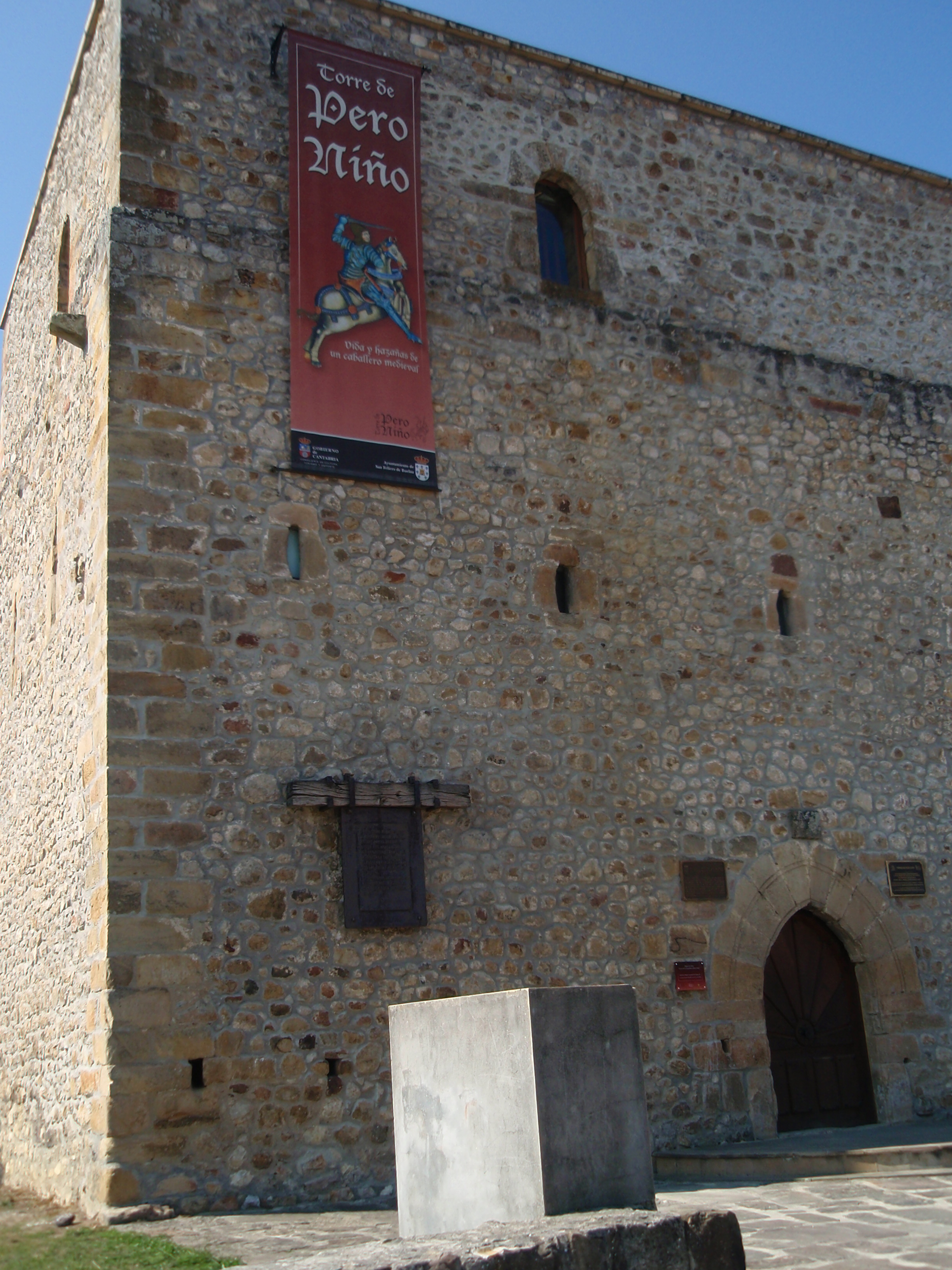 Torre de Pero Niño, la Aguilera, casona solariega de los Cevallos.